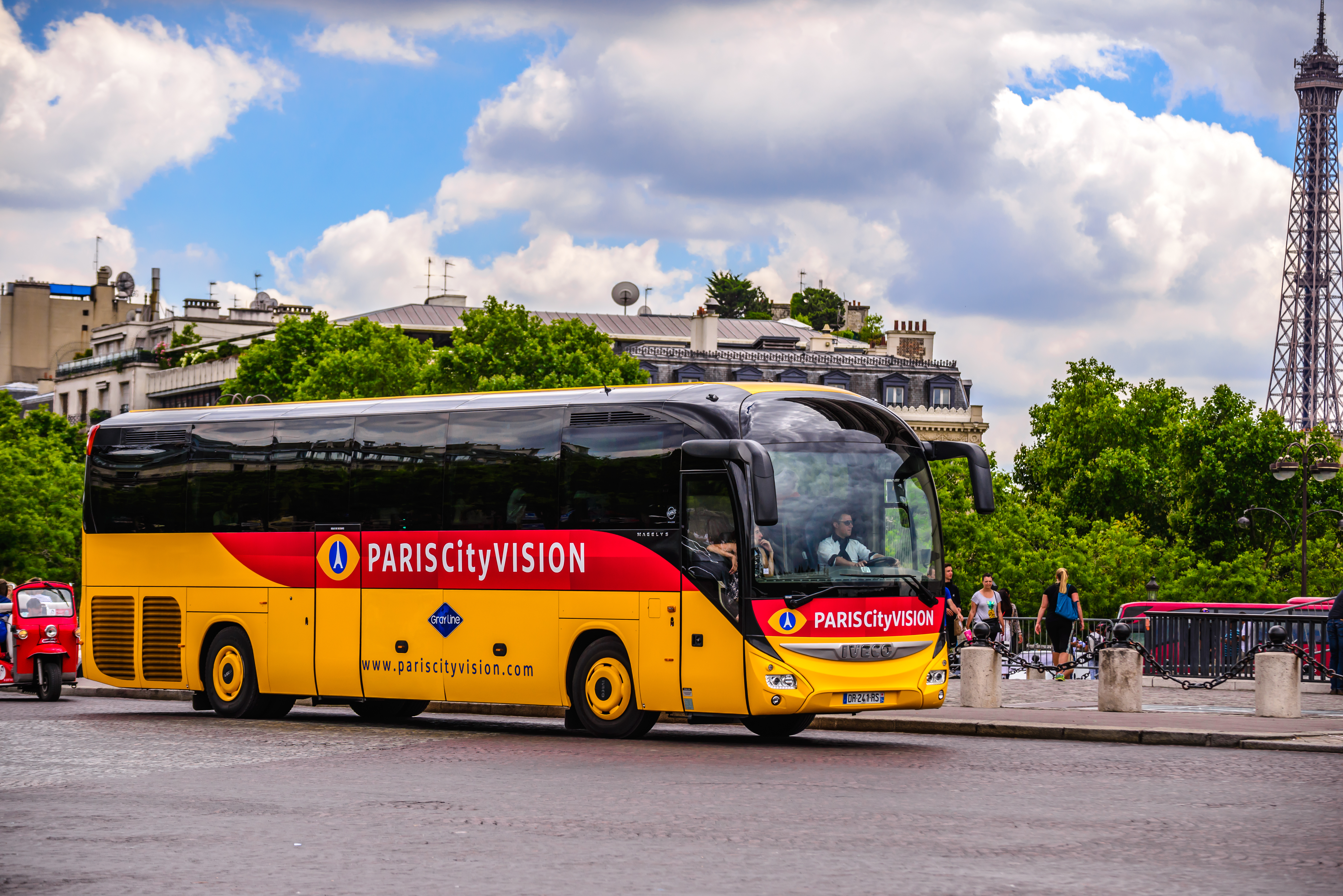 Tout à fait par hasard, je tombe sur ce Magelys dont j'ignorais la présence au sein du parc Visual... Le numéro de parc est là mais en tout petit donc non lisible.